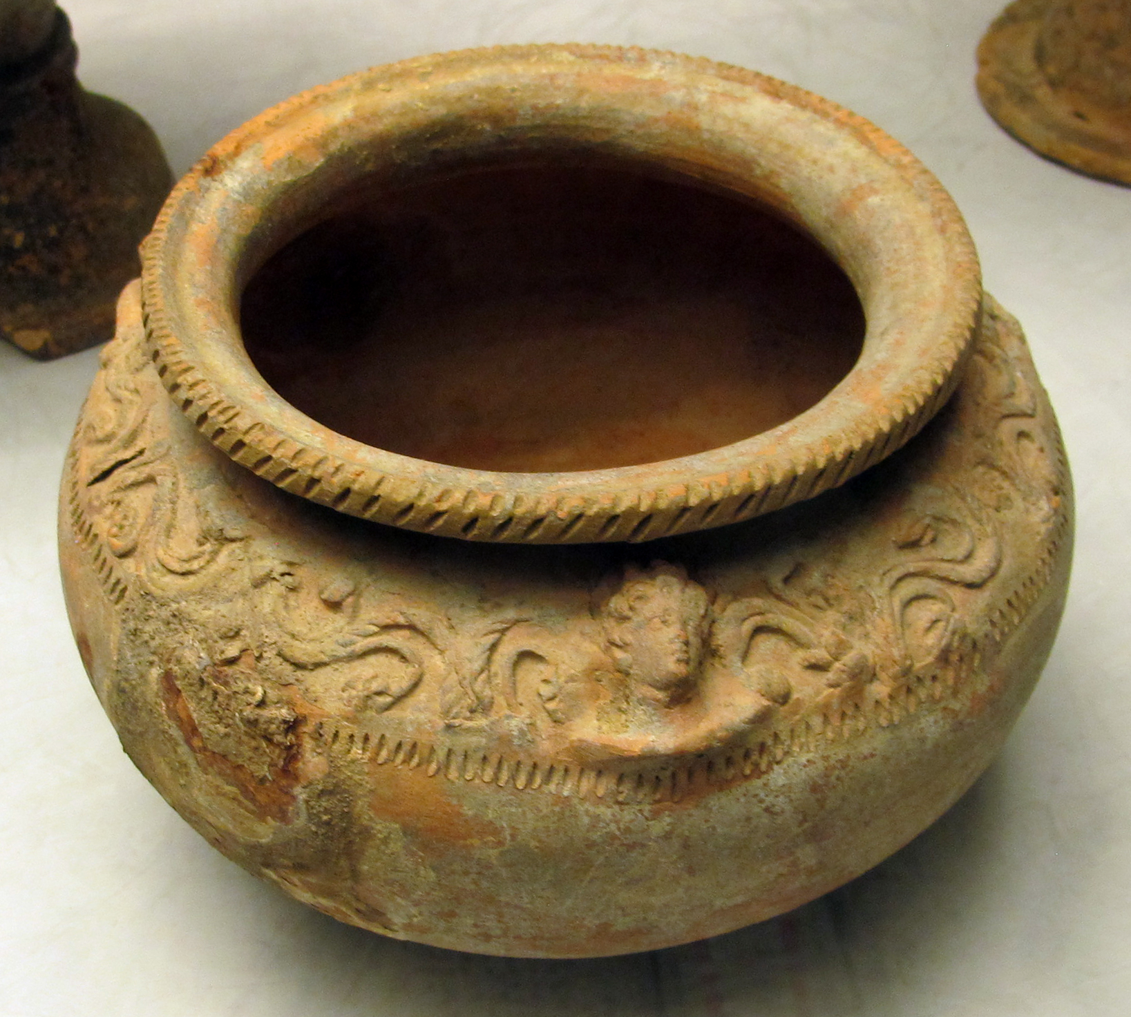 Museo Claudio Faina